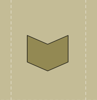 ՀՀ ԶՈՒ ավագ սերժանտ զինվորական կոչում